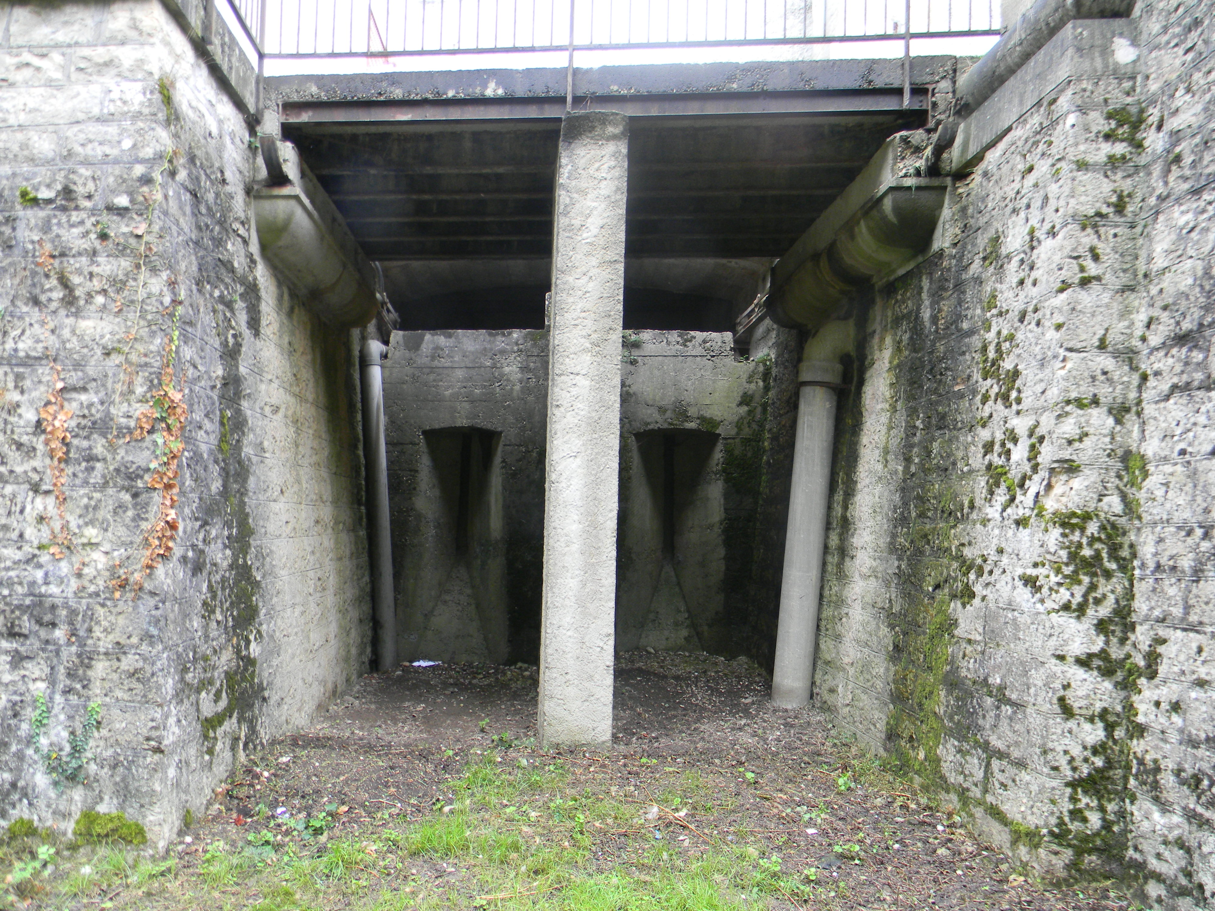 Fosse sous le pont escamotable de l'entrée arrière du Fort de Saint-Priest. La colonne en béton a été rajoutée en 1977 pour figer le pont. On distingue au fond deux meurtrières et l'espace pour ranger le pont en cas d'attaque.